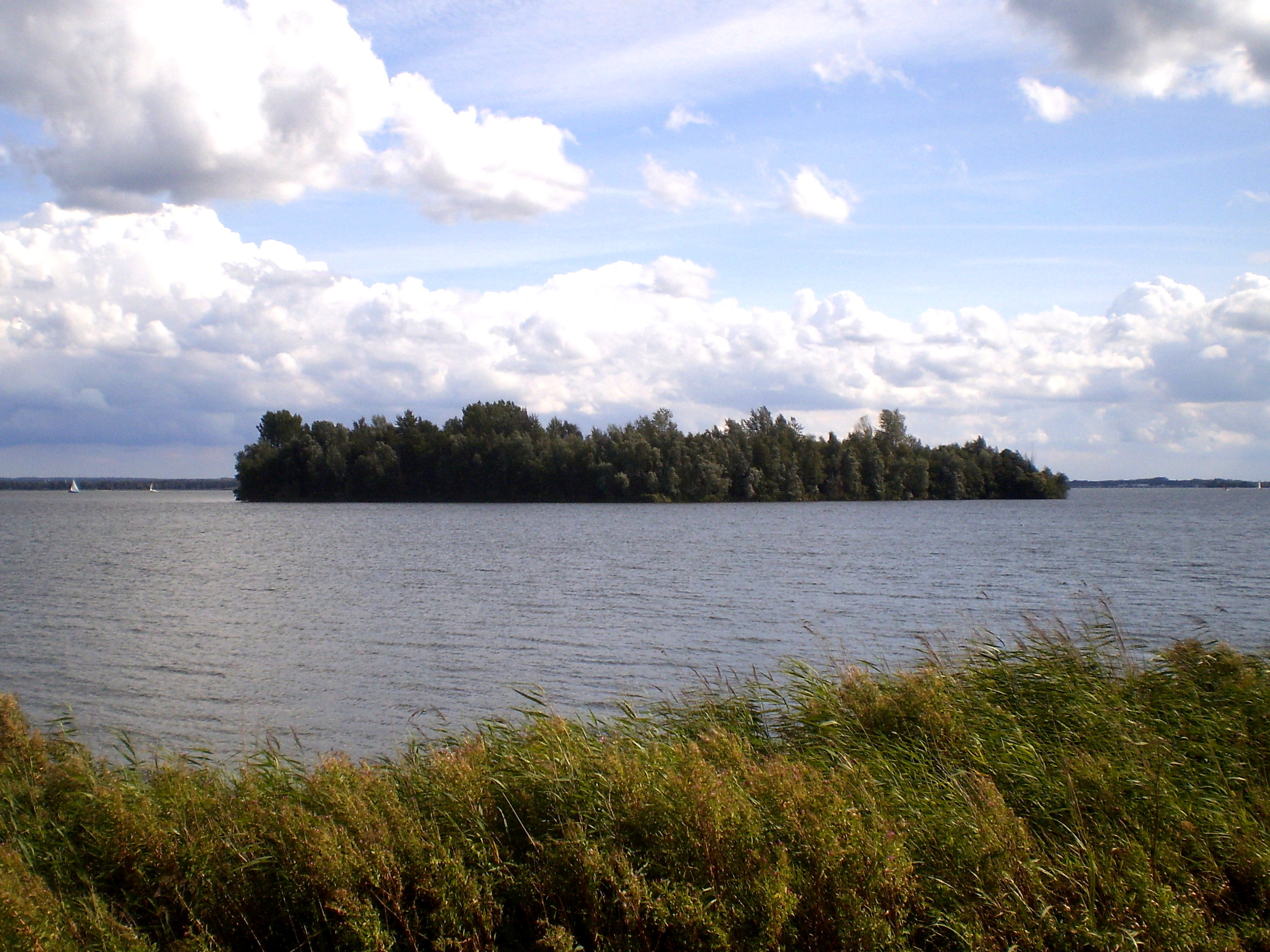 Eiland 'De Biezen' in het Wolderwijd tussen Harderwijk en Zeewolde